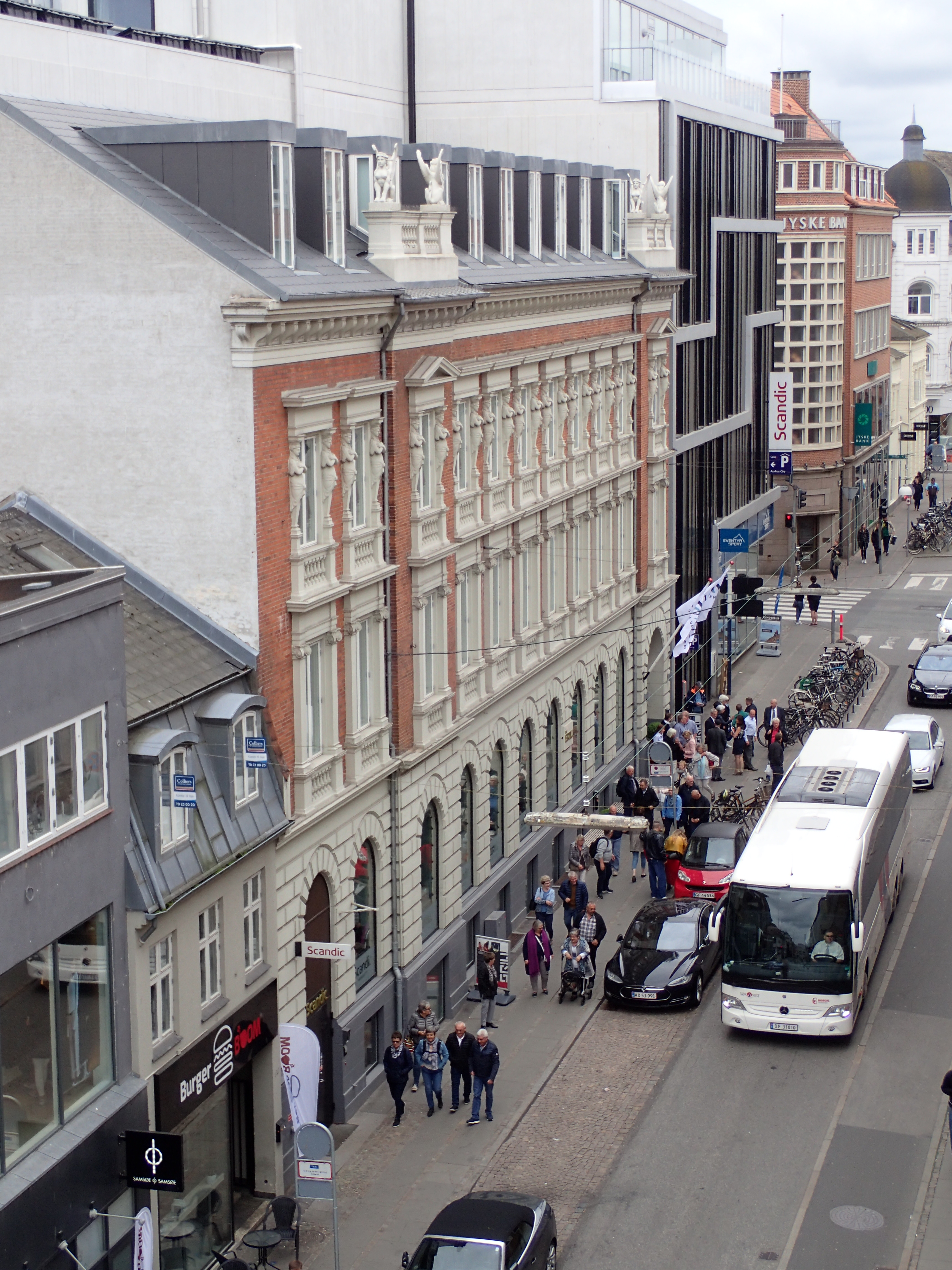 Hotel Scandic Aarhus City i Østergade, Aarhus.